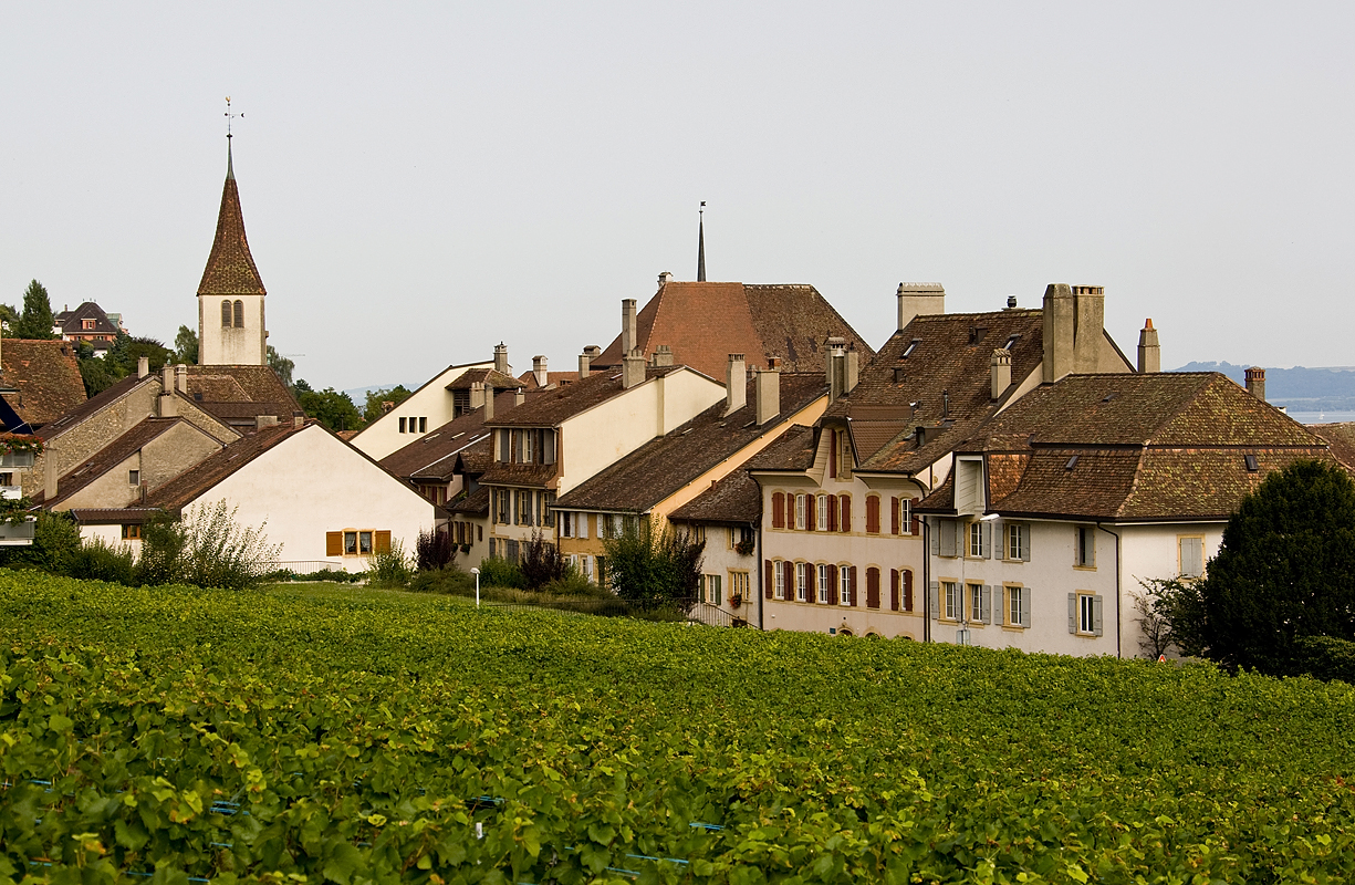 Blick vom Westen auf Auvernier